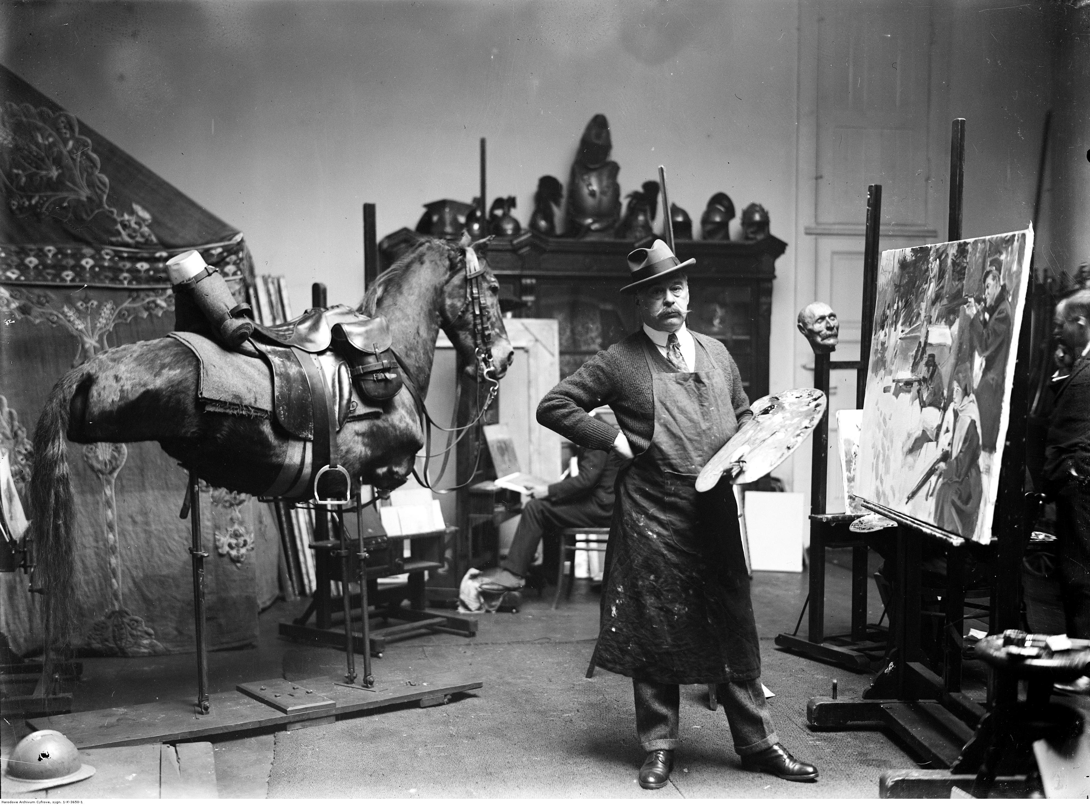 Wojciech Kossak, artysta malarz w swojej pracowni.